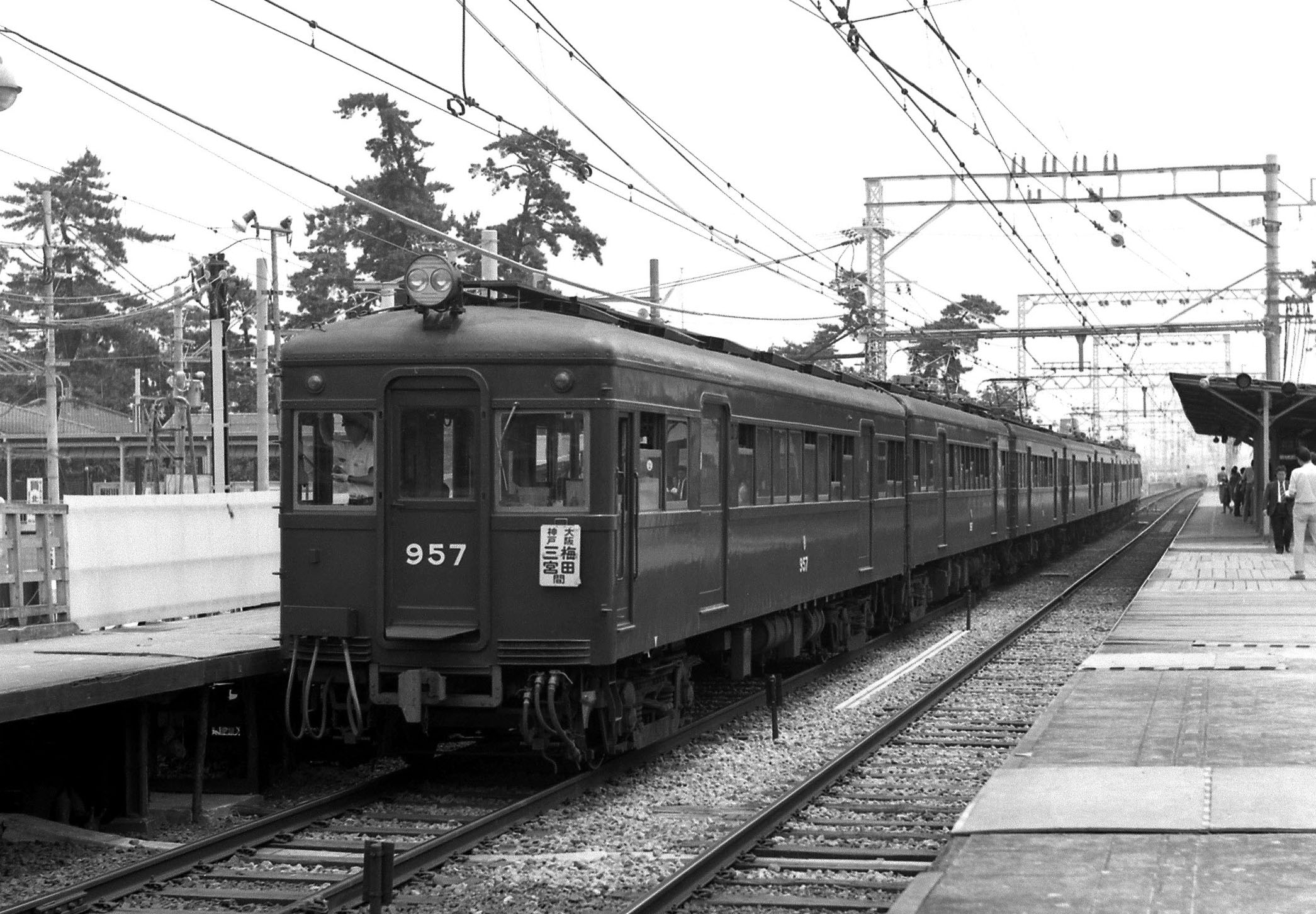 阪急950形957を神戸方最後尾にした7連 神戸線夙川駅にて